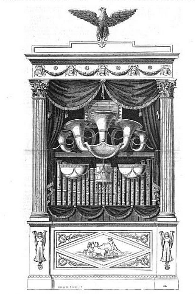 Panharmonicon. Inventé par Johann Nepomuk Maelzel (1772-1838). Image provenant de L'Illustration, 25 mai 1846